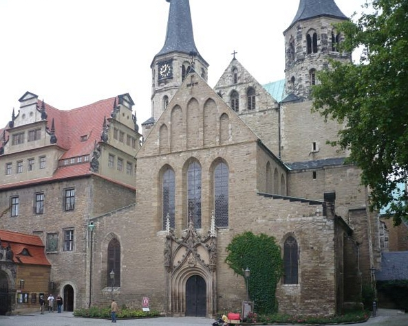 Merseburg, Dom mit Schloss